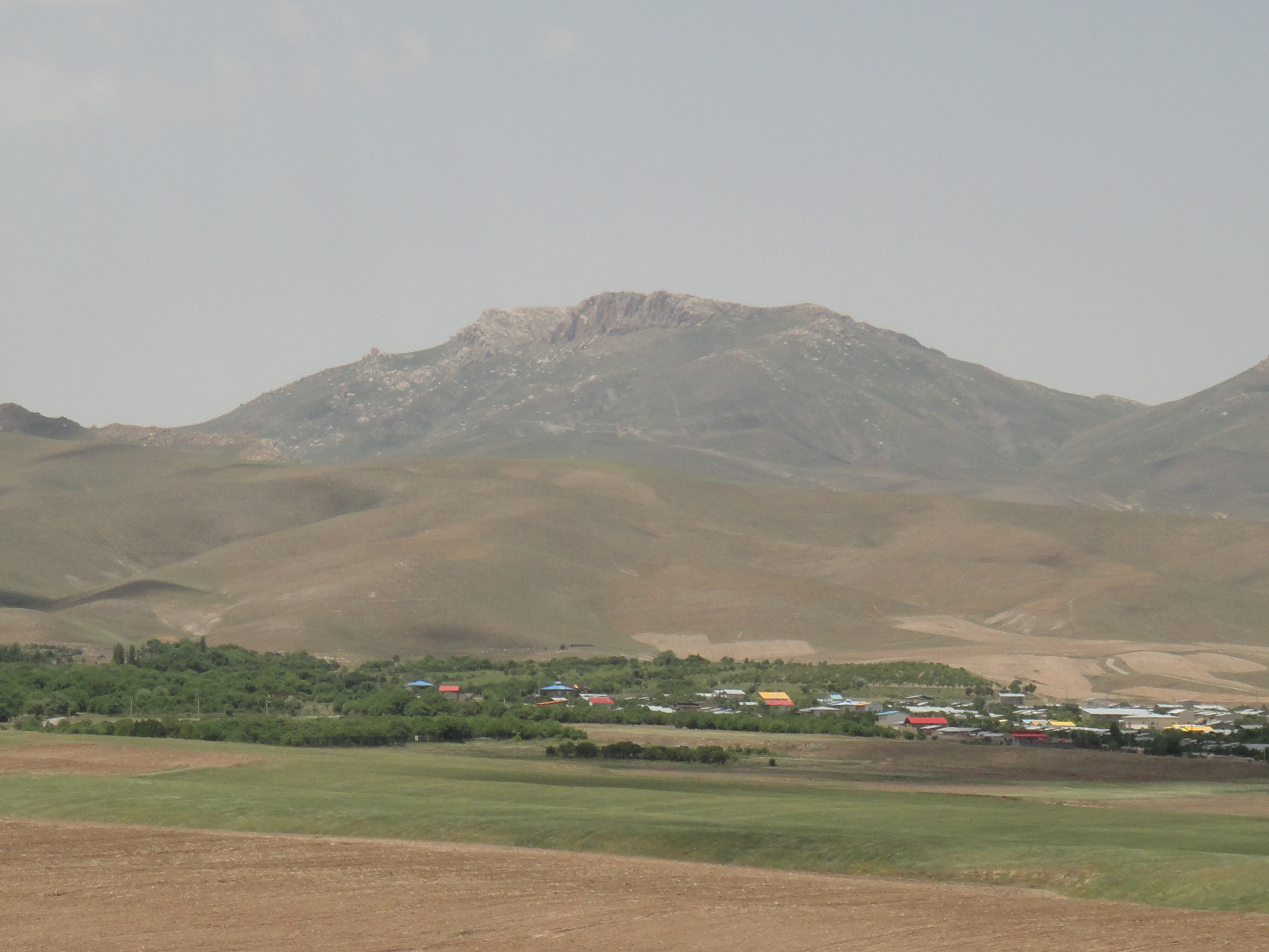 changoreh by mzamani